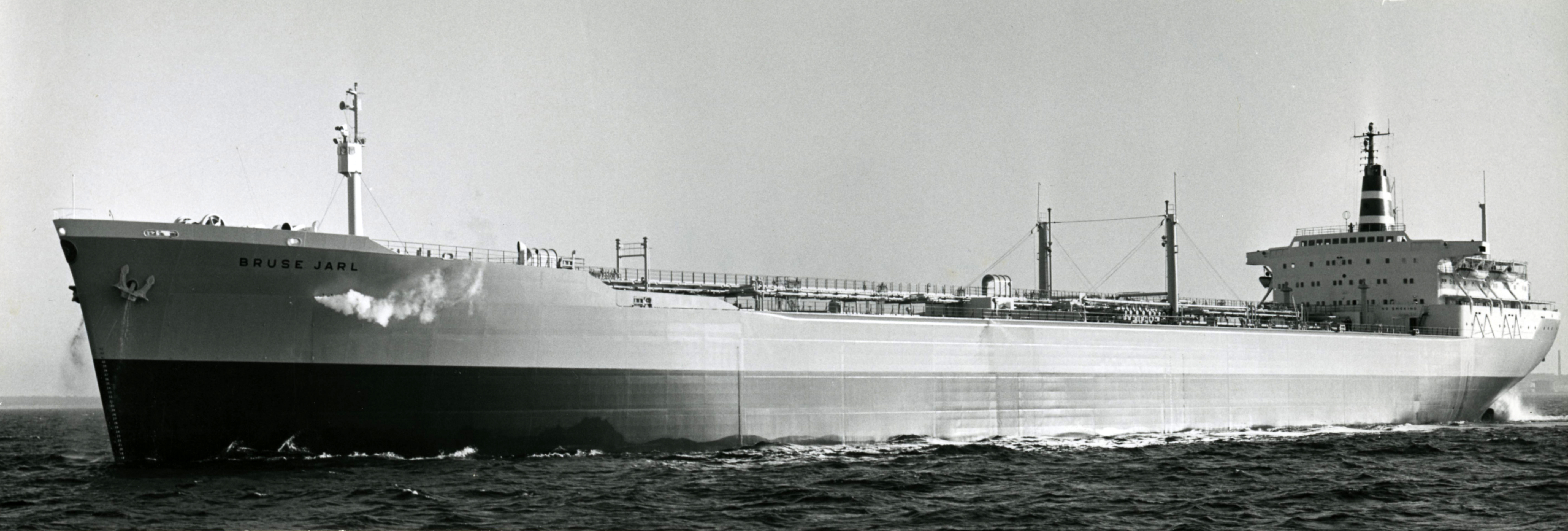 M/T Bruse Jarl (III). Build 1964 at Kockums mek. Verkstads A/B, Malmö, Sweden. Owned by Nordenfjeldske Dampskibsselskab A/S, Trondheim, Norway 1964-1969.